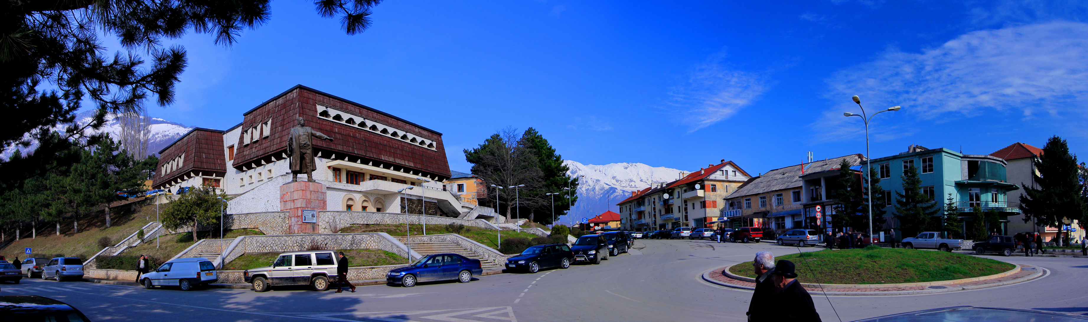 Bajram Curri Panoramë